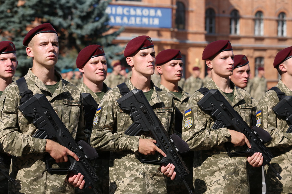 Всього ж на І курс навчального закладу зараховано 350 чоловік, більше третини – діючі військовослужбовці, 60 з них – учасники бойових дій на сході країни. Цього року у військовому навчальному закладі вперше розпочинається підготовка до нової спеціальності – спеціалістів повітрянодесантної служби. – Це фахівці, які займаються парашутною справою, підготовкою та організацією стрибків з парашутом, як особового складу так і десантування техніки. Це не тільки для десантно-штурмових військ, це також і для морської піхоти, для розвідувальних підрозділів сухопутних військ та для інших військових формувань, – розповів начальник академії генерал-майор Олег Гуляк. Слід зауважити, що офіційний набір на спеціальність морська піхота відбувся втретє, проте завдяки переходу курсантів з інших факультетів вже укомплектовано всі чотири курси. Цього року до академії вступило 20 дівчат. Половина з них – військовослужбовці, інші – з сімей військових. Молоді люди завіряють, що йдуть служити за покликом серця. По завершенню ритуалу під музичний супровід першокурсники пройшли урочистим маршем, демонструючи військову виправку. Попереду в них 5 років навчань за професійним спрямуванням. Анастасія Ільяш, ЦТРС МОУ Фото Валентин Журавльов